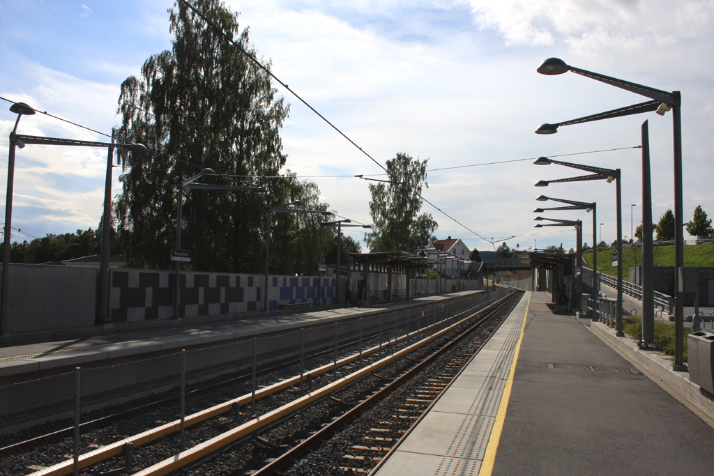 Ringstabekk T-banestasjon sett fra vestgående plattform